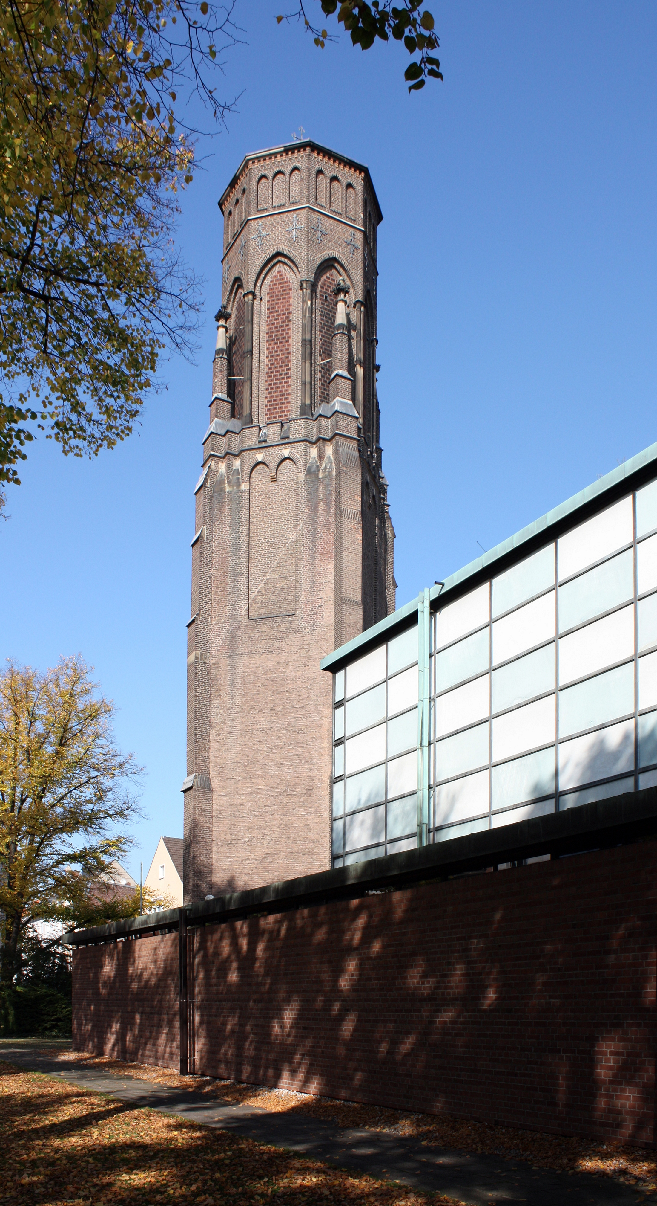 St. Stefan, Köln-Lindenthal